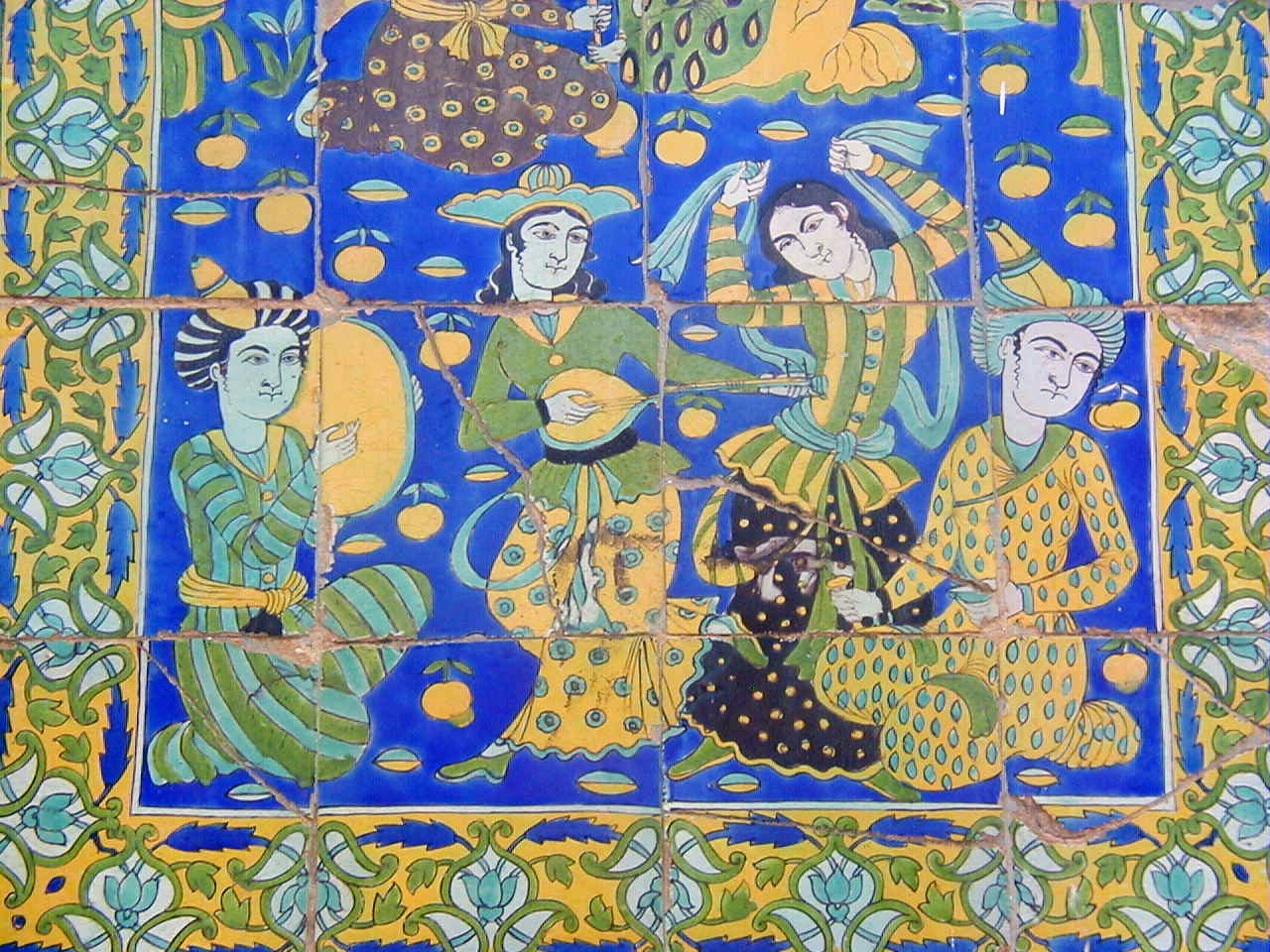 faïence, terrasse du palais d'orient, tunis